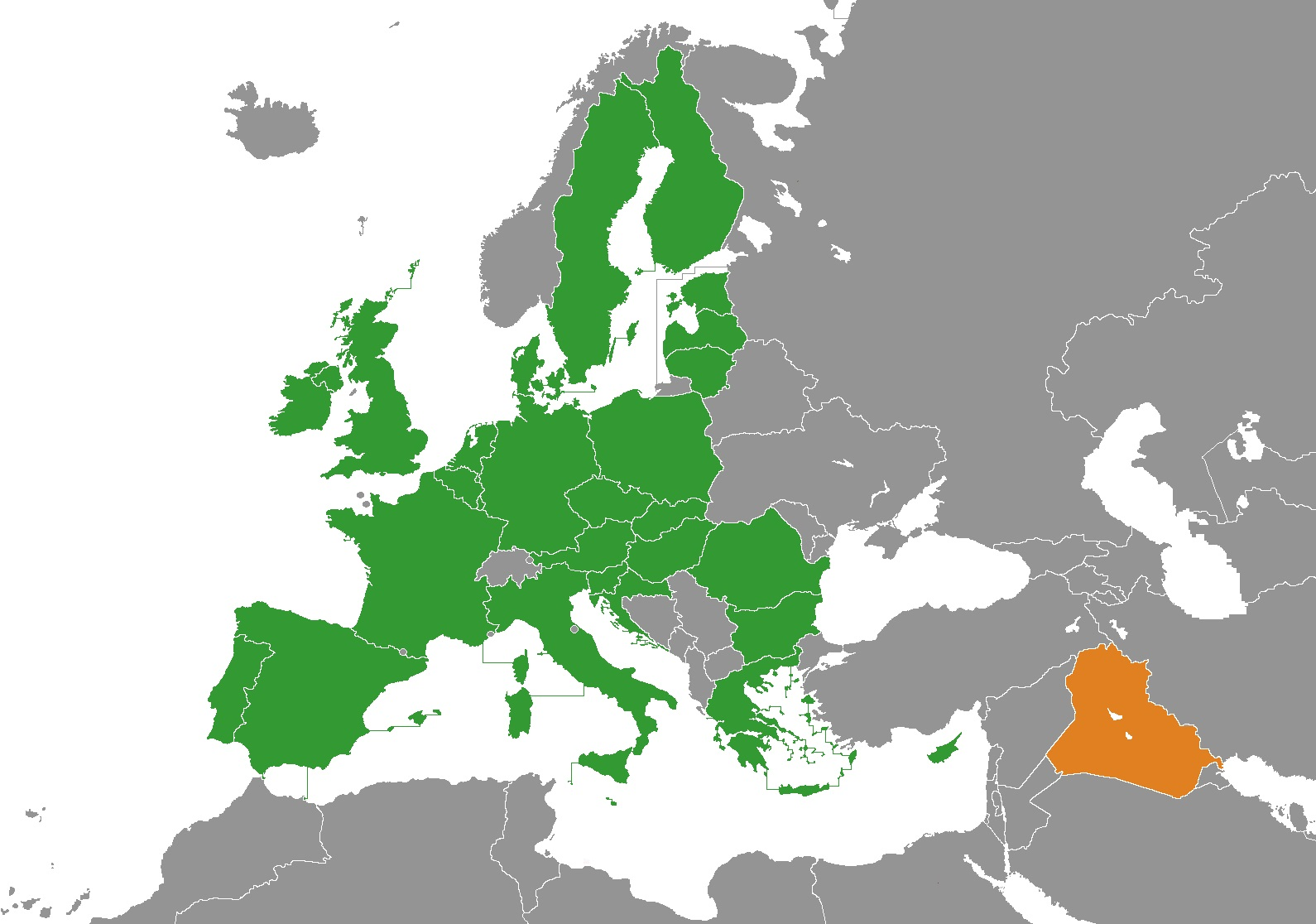 Unión Europea (verde), Irak (naranja).